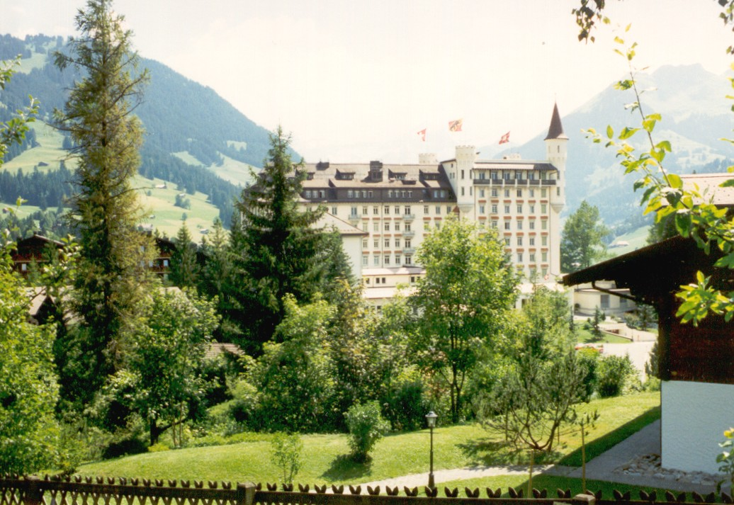 The Gstaad Palace, a Swiss Hotel in July 1994 L’Hôtel Gstaad Palace en juillet 1994 Gstaad Palace Hotel em Julho de 1994